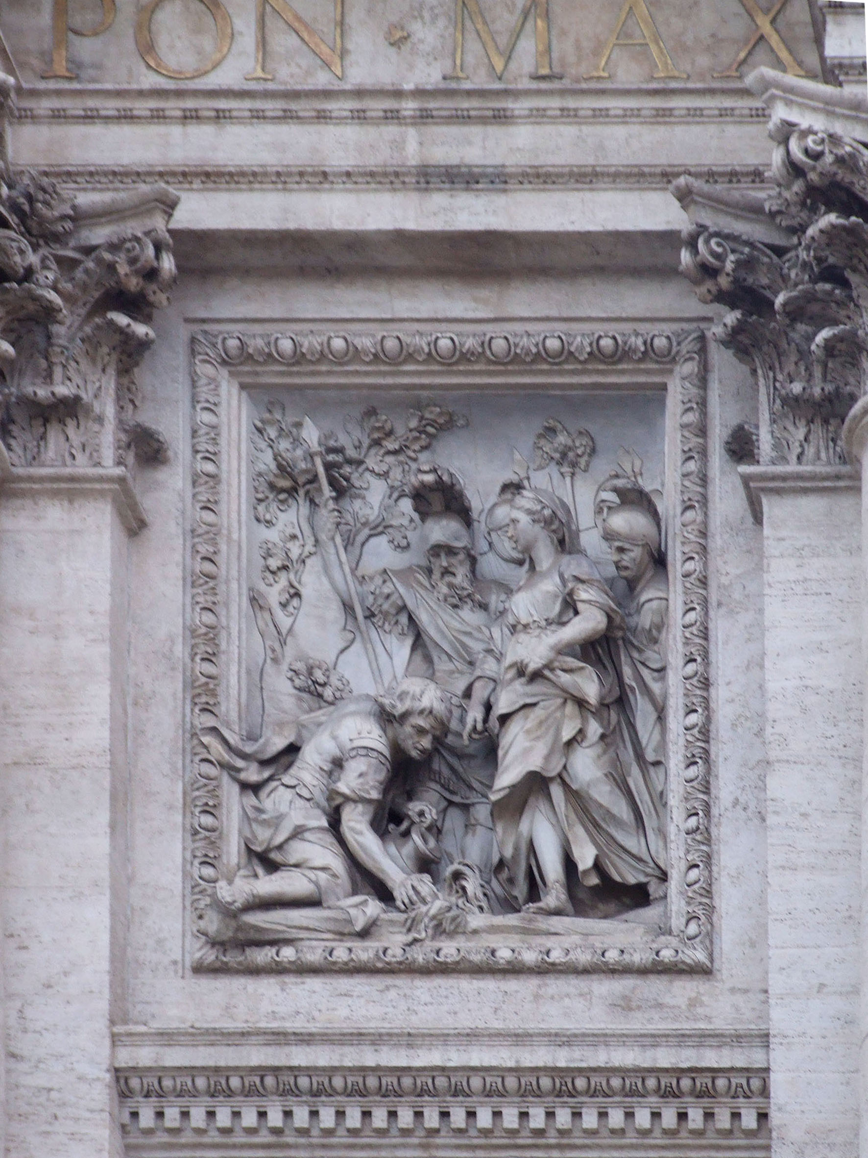 Fontana di Trevi, Roma, Dettaglio